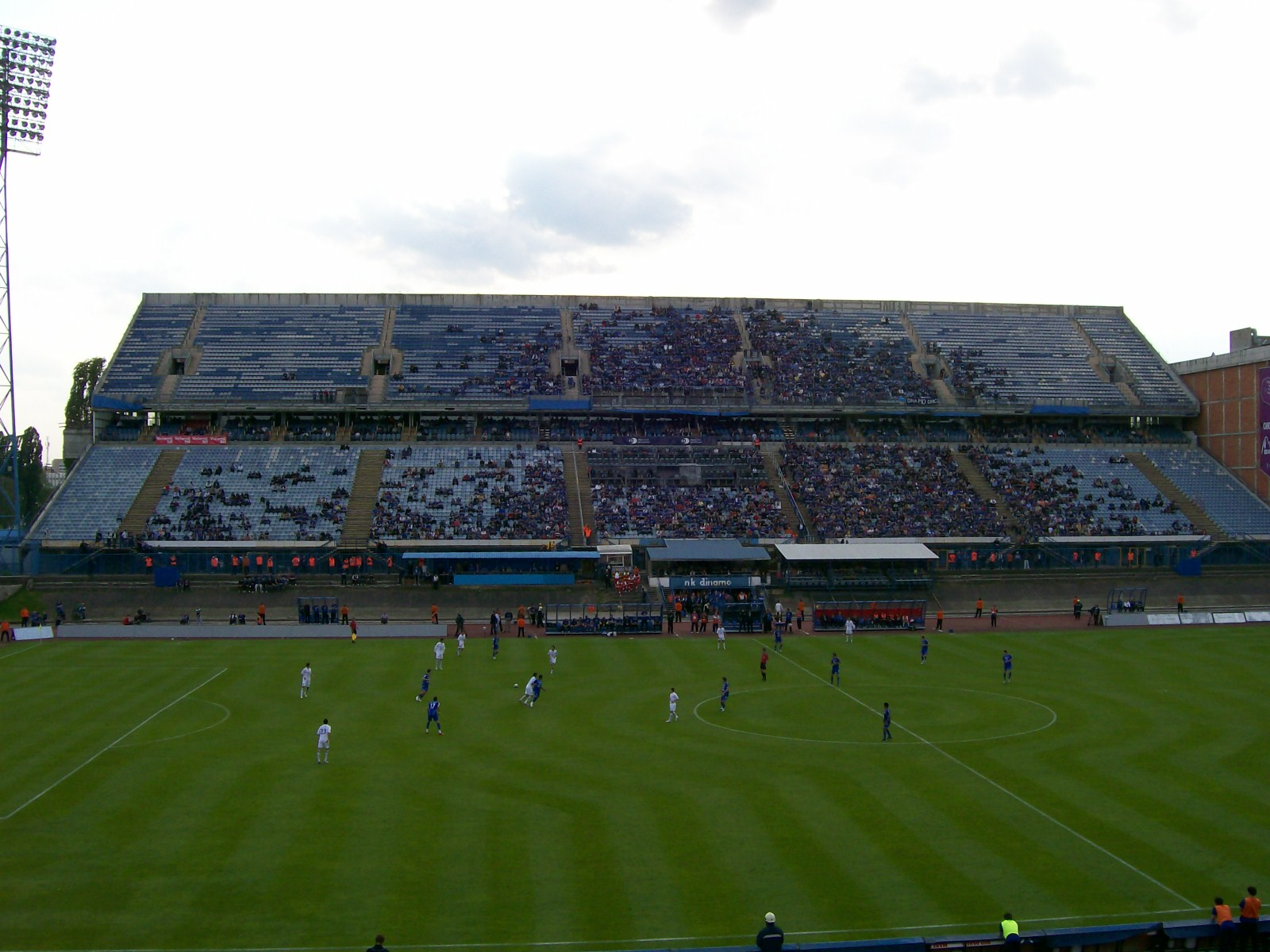 Zapadna tribina Stadiona Maksimir